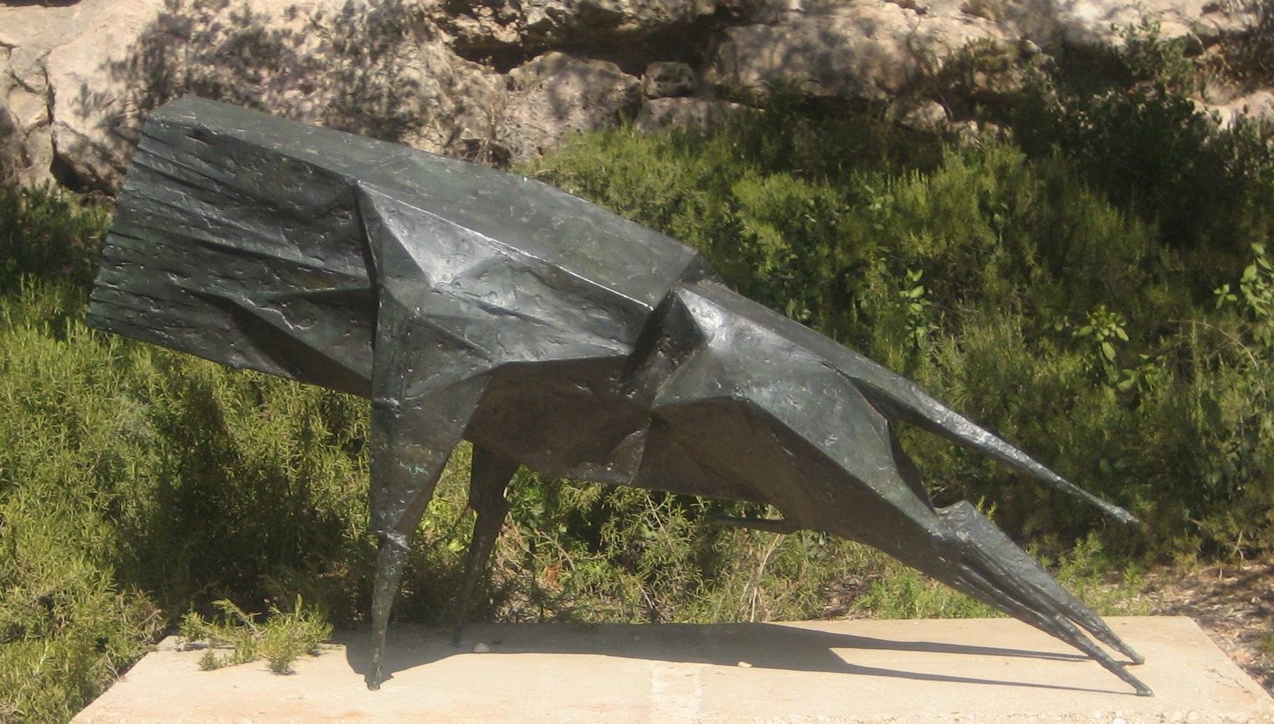 Sculpture